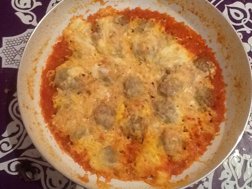 الكفتة بالبيض والطماطم This is an image of food from Morocco